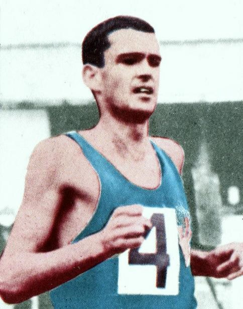 CAMPIONI DELLO SPORT 1966/67 - Figurina/Sticker n. 43 - RON CLARKE -Rec